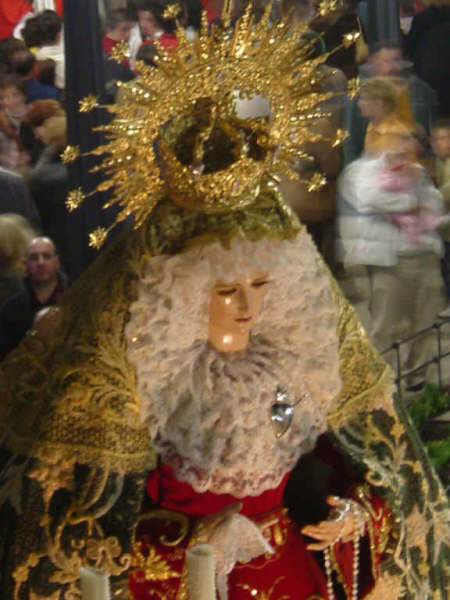 Nuestra Señora de la Amargura de Daimiel (Ciudad Real. Ntra. Sra. de la Amargura desfilando por las calles de Daimiel.